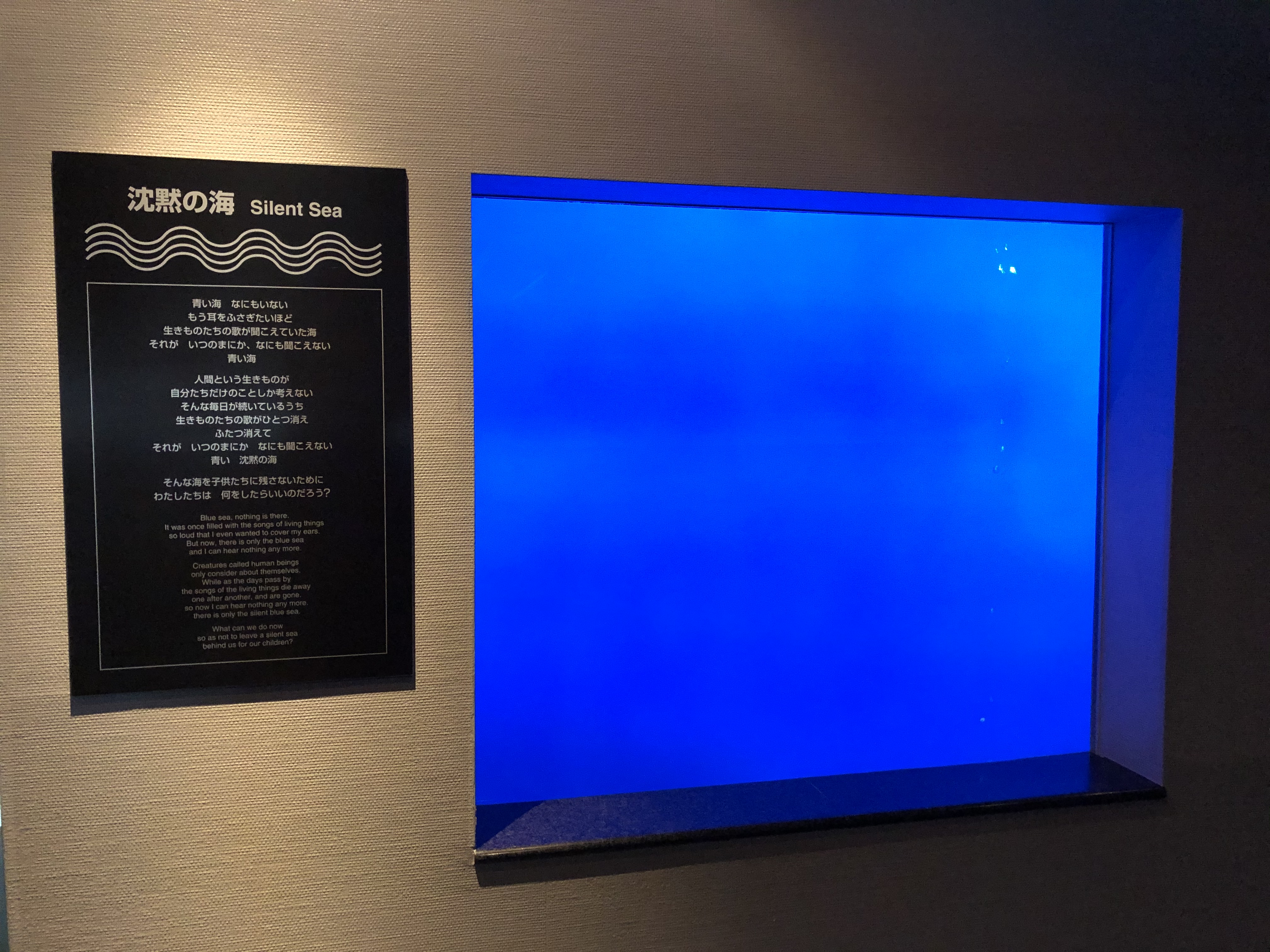 いおワールドかごしま水族館の「沈黙の海」